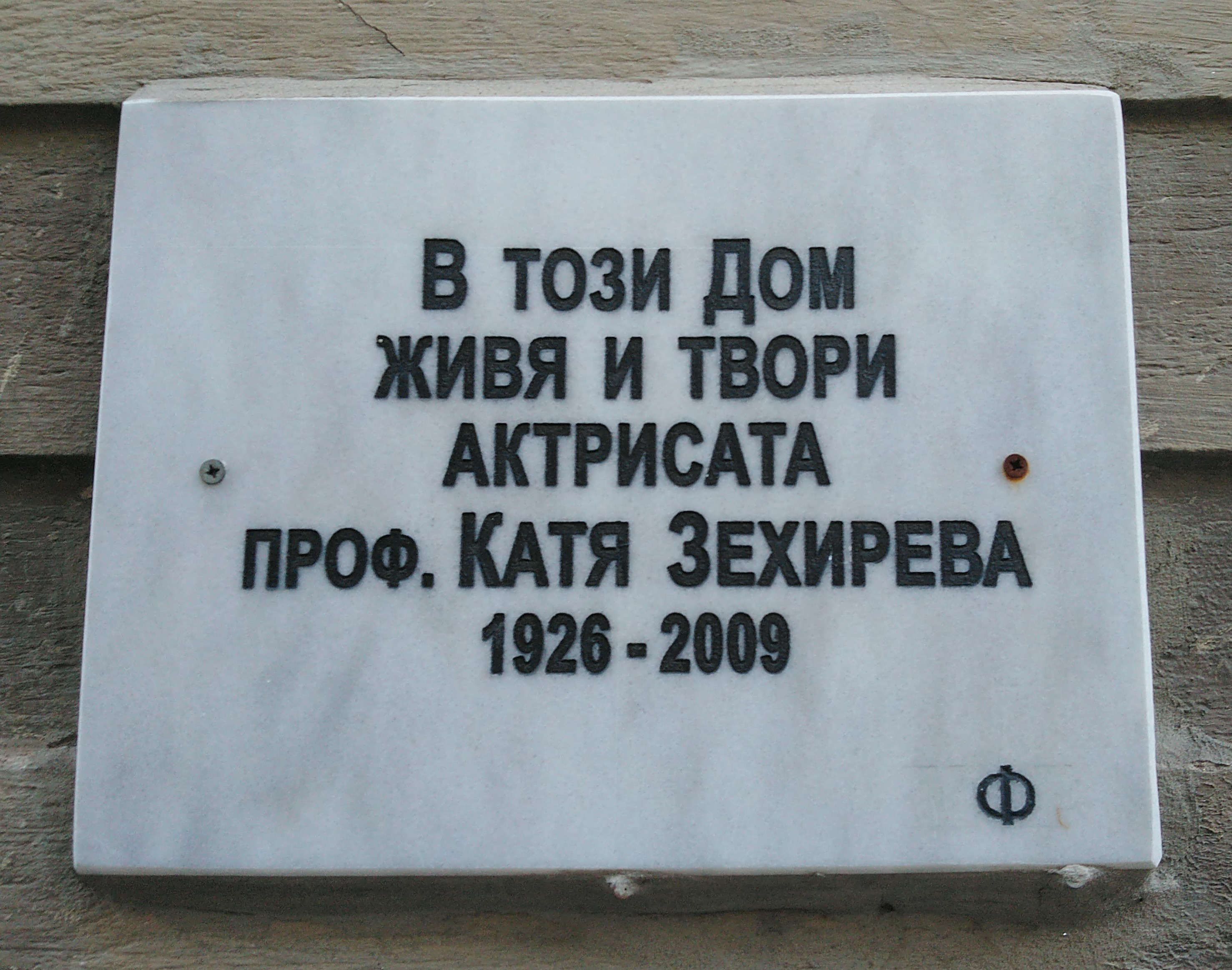 Katya Zehireva memorial plaque, 6 Nikolay Pavlovich Str., Sofia